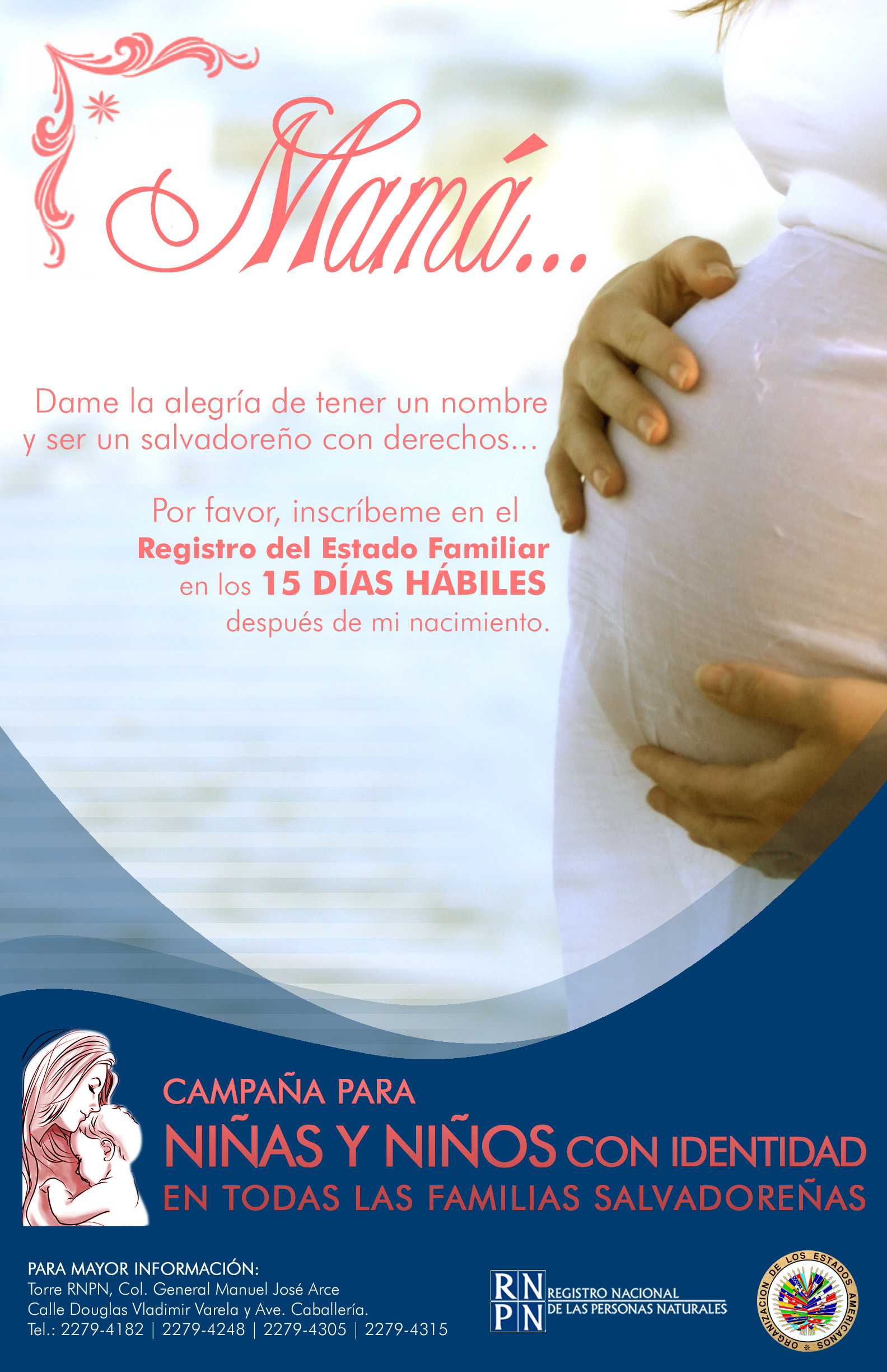 Afiche para promover la inscripción de los recién nacidos en el Registro Civil instalado en el hospital de Sonsonate (El Salvador)